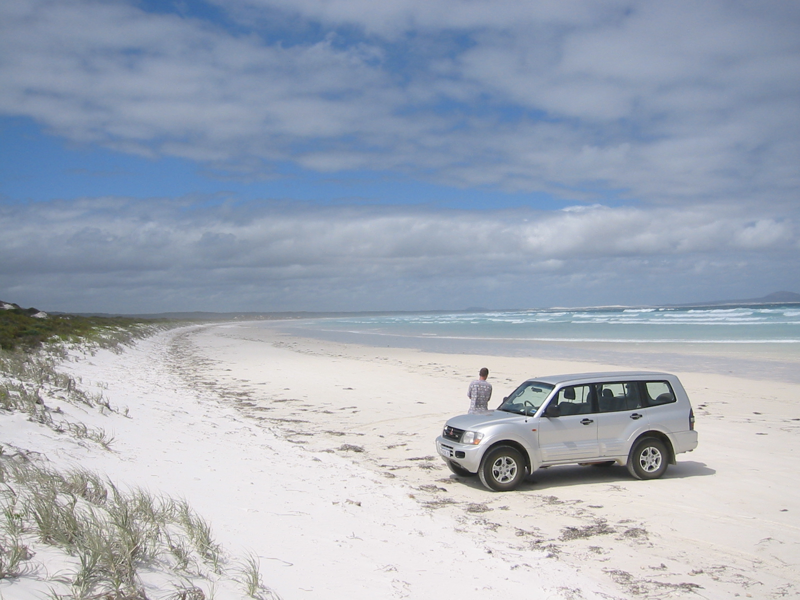 lang gestreckte Bucht im Cape Arid NP